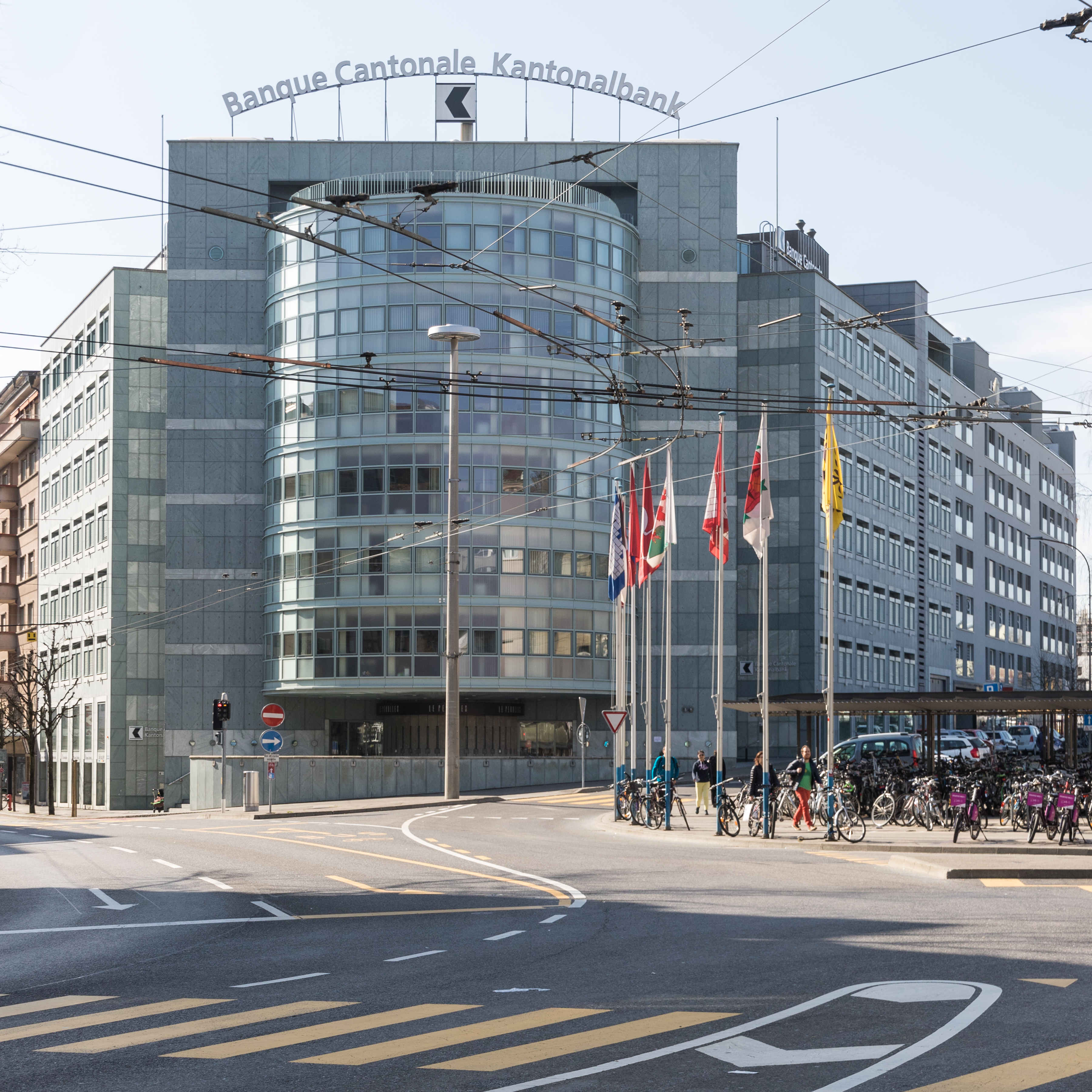 Hauptsitz der Freiburger Kantonalbank in der 2-sprachigen Stadt Freiburg/Fribourg. Architekt ist Mario Botta.